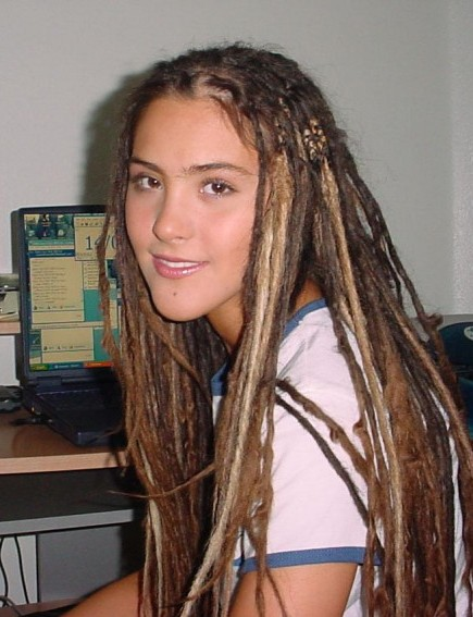 Chat con sus fans del foro univisión, 14 Julio 2003.